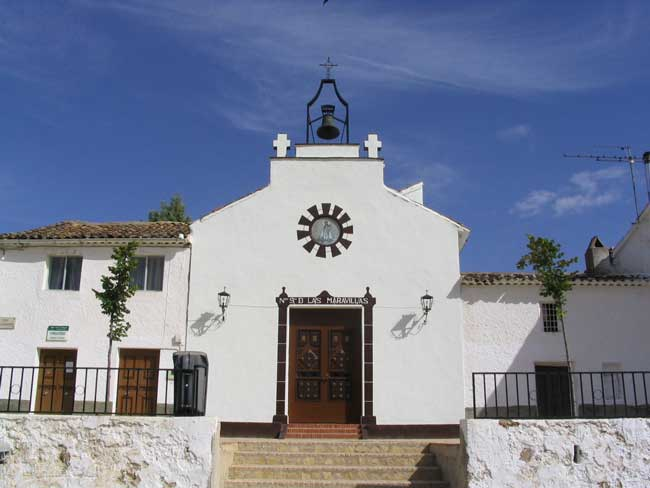 Fachada de la iglesia parroquial de Cañada Catena